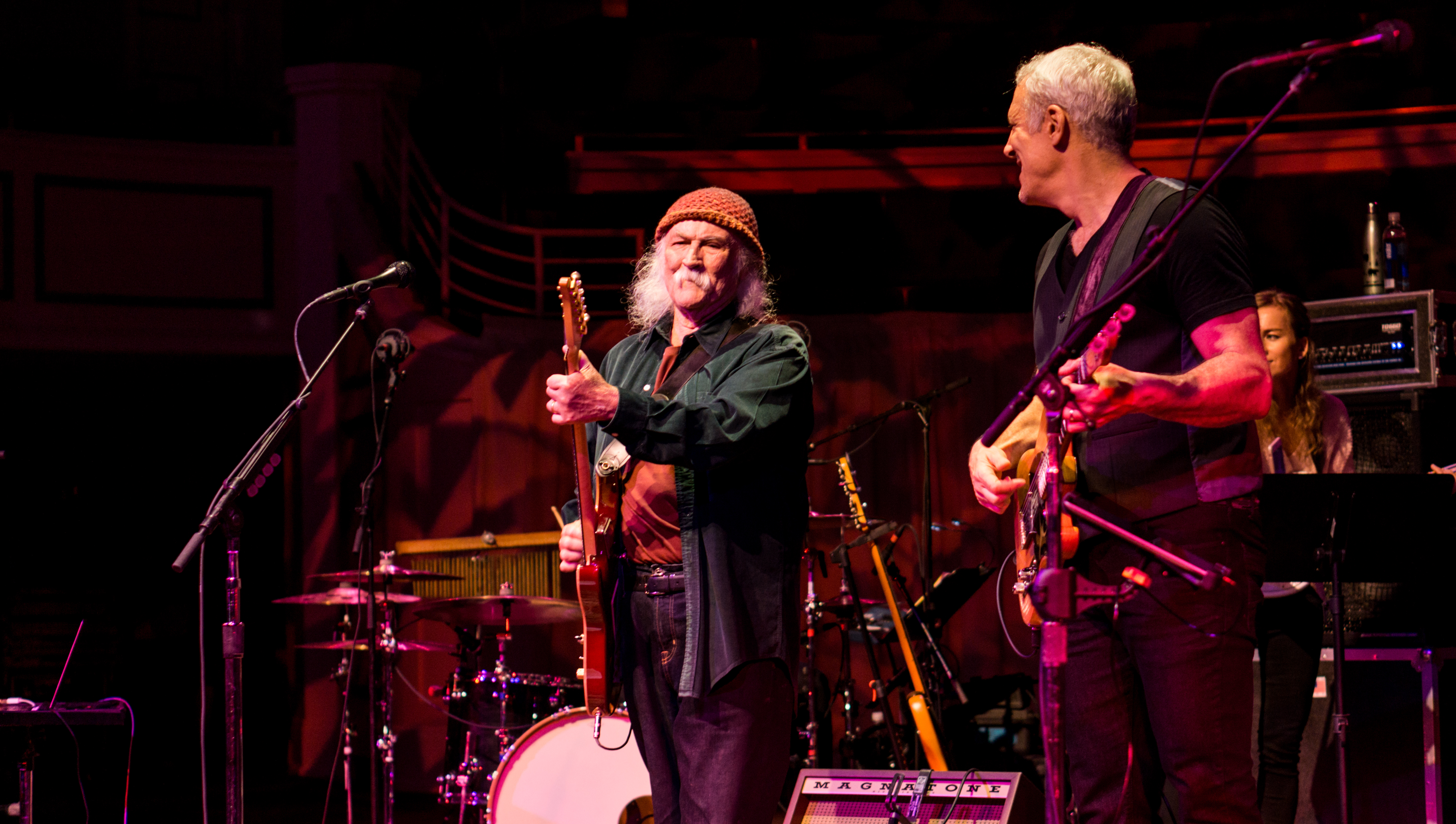 DavidCrosbyCarmel041117-30